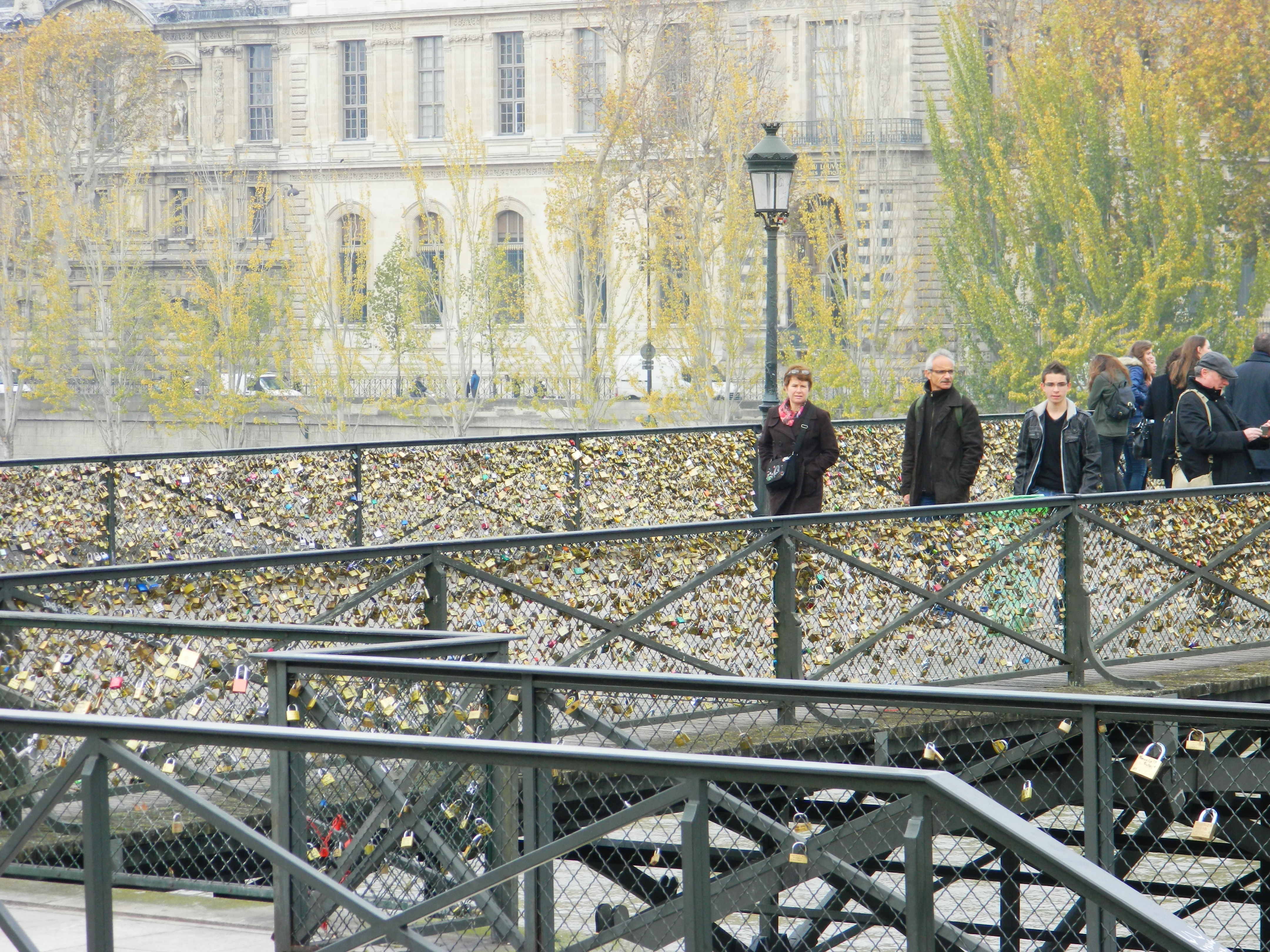 Pont des Arts, Paris, France.